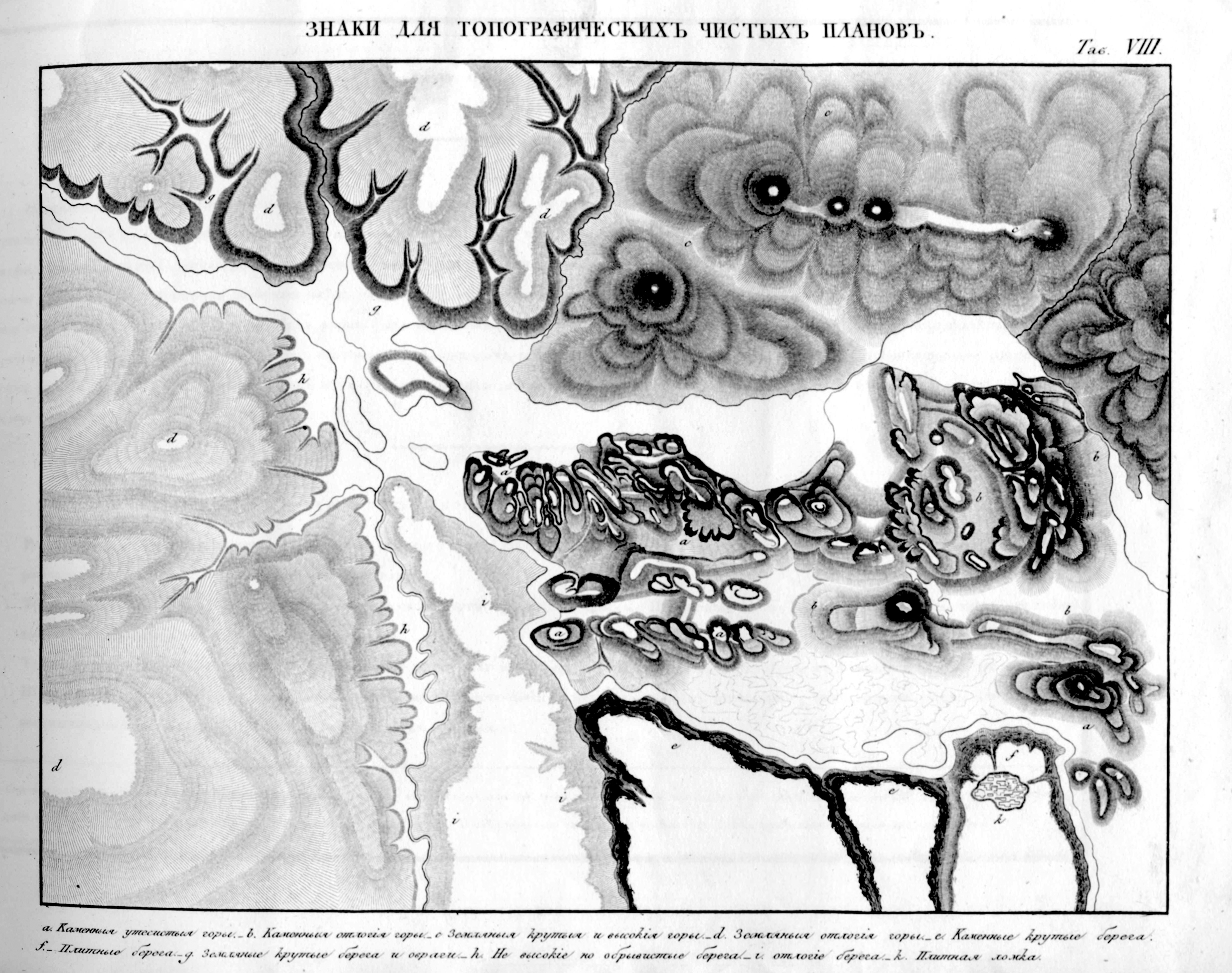 условные знаки 1822 года для чистых планов